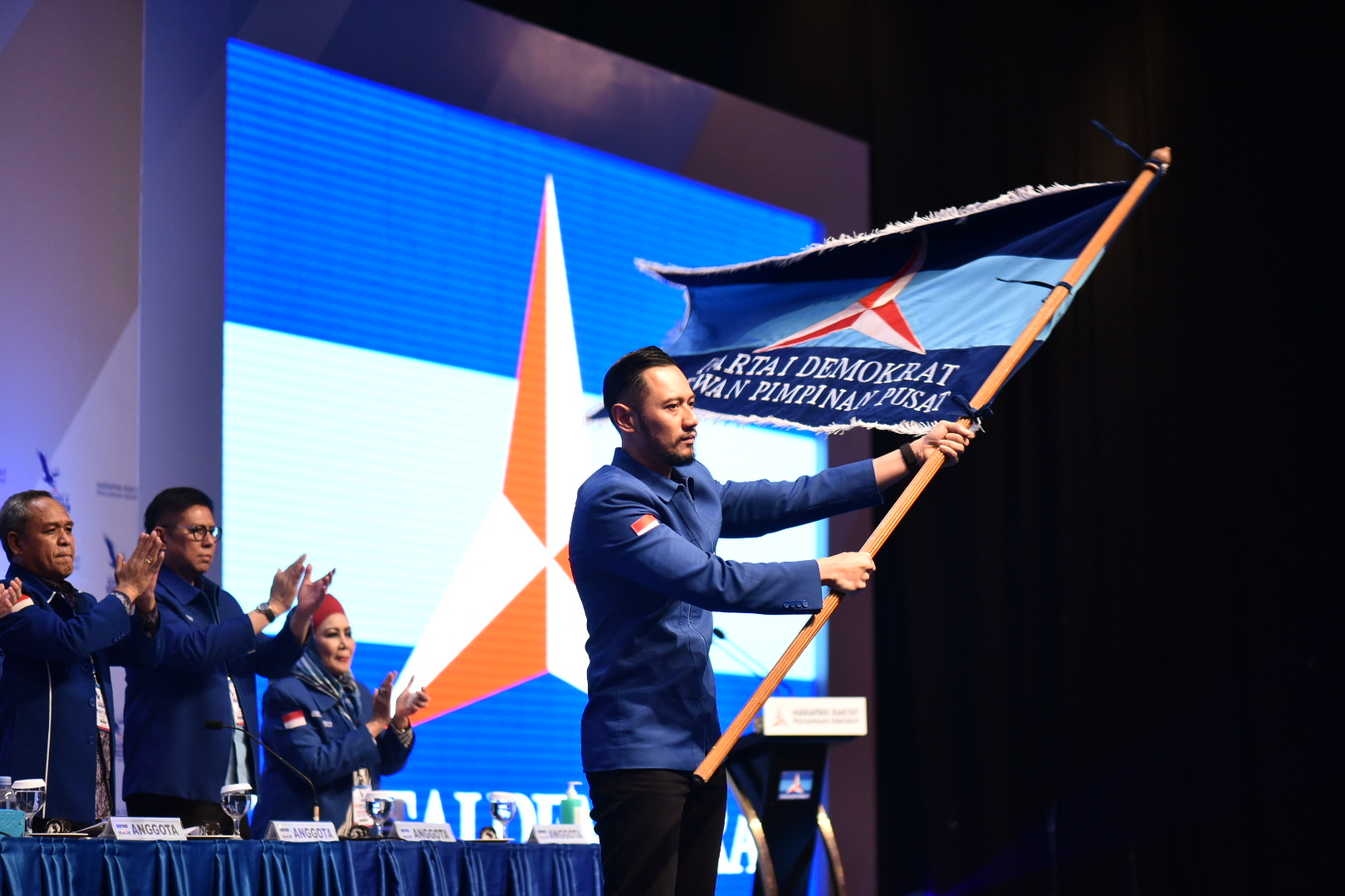 Foto Ketua Umum Partai Demokrat Agus Harimurti Yudhoyono